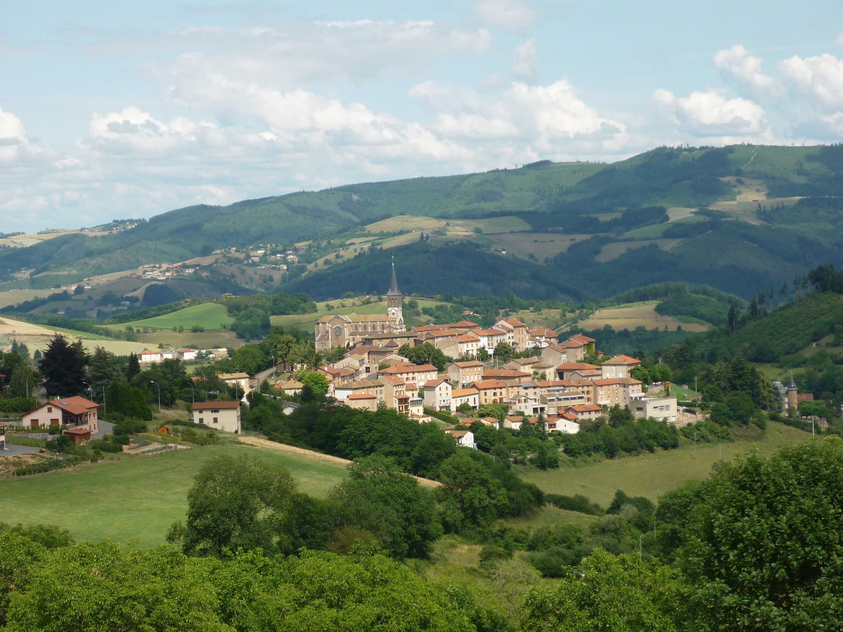 Vue du village de Saint-Just-d'Avray, dans le département du Rhône en France. Cette vue a été prise depuis l'ouest de la commune, à environ un kilomètre de l'entrée du village.